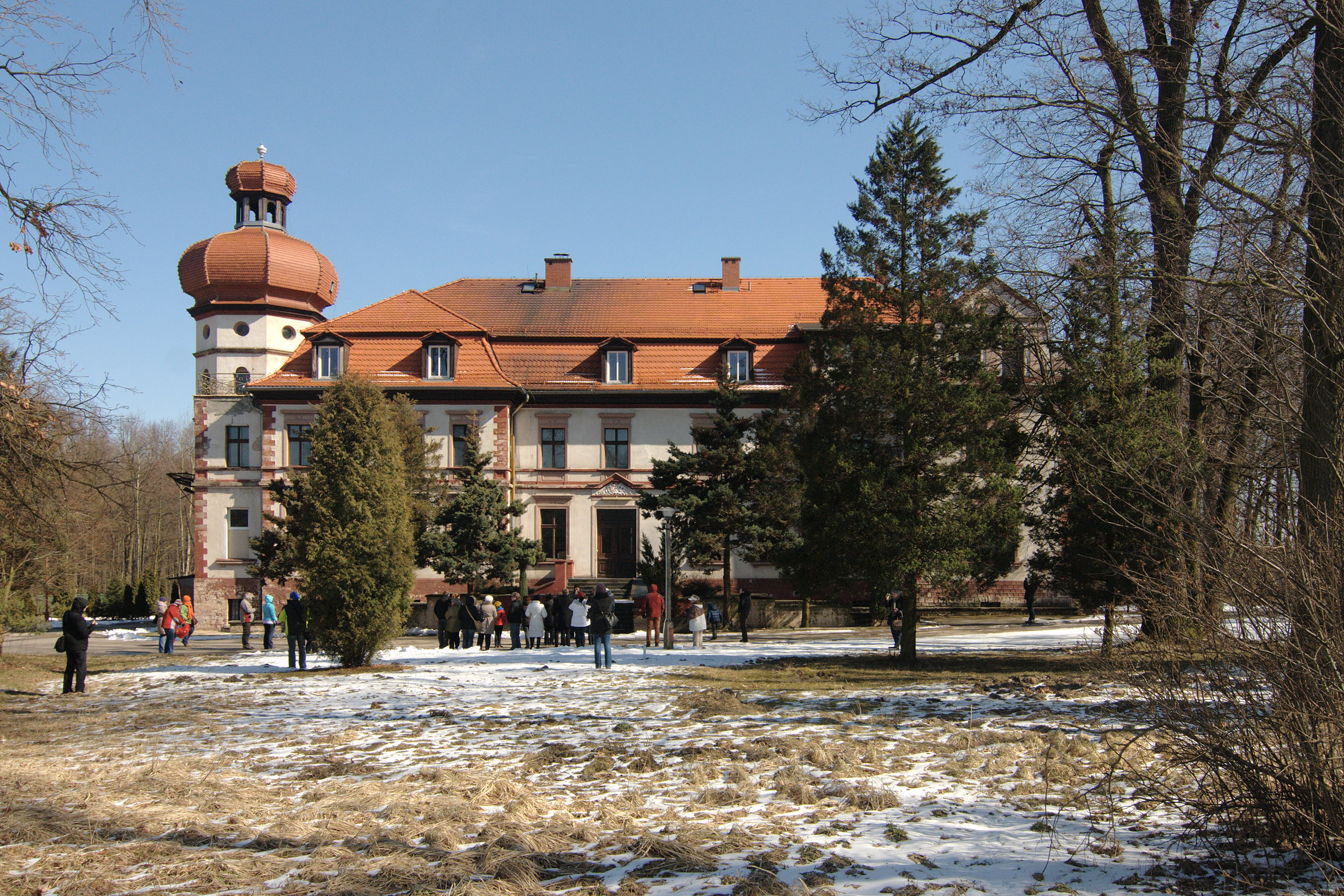 Pałac w Miedarach.